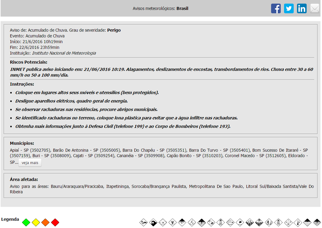 Descrição completa do aviso, contendo instruções sobre o que se fazer e possíveis consequências.